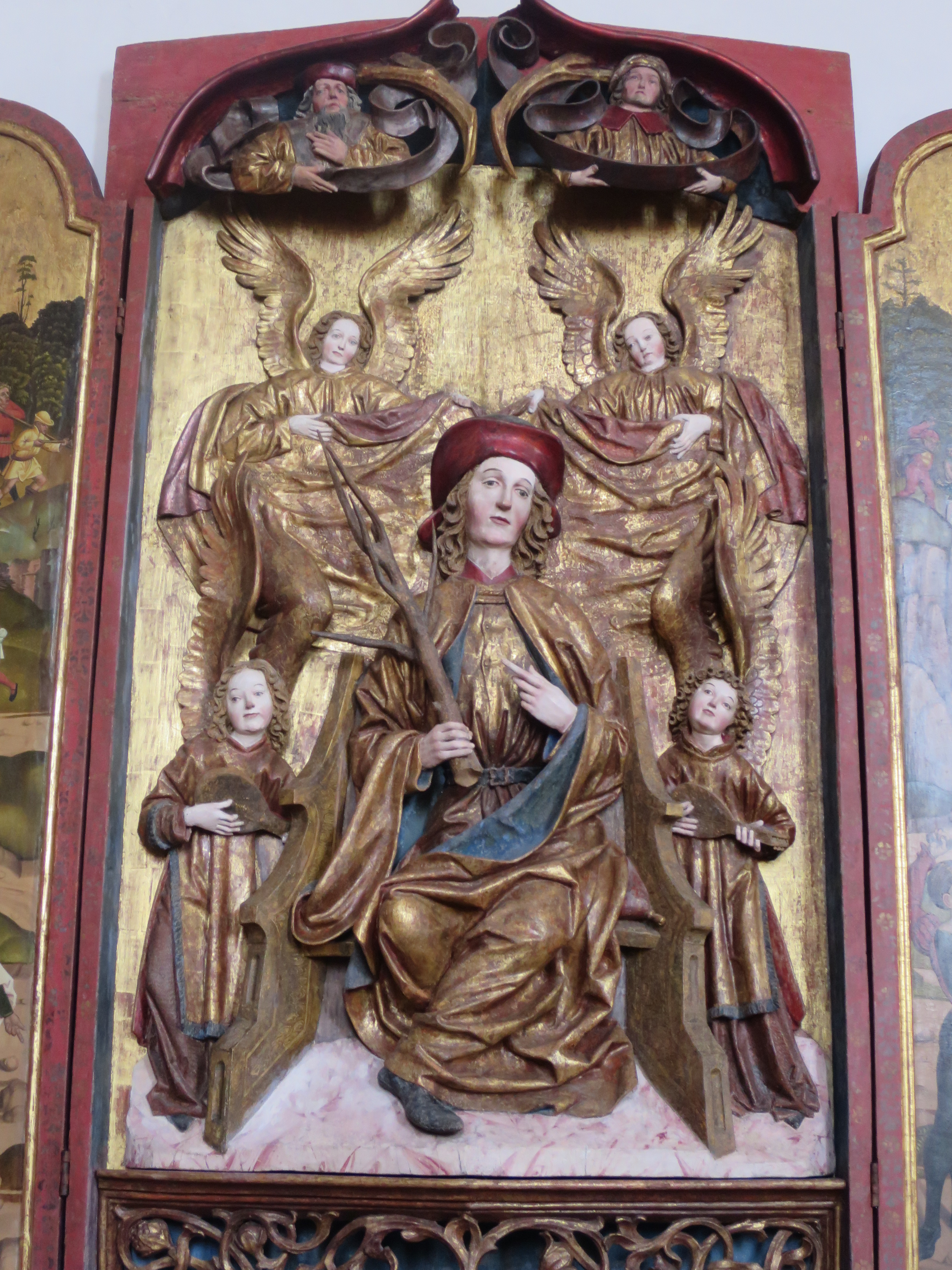 Achatiusaltar von Erasmus Grasser 1506.Im Mittelteil die Figur des Heiligen.